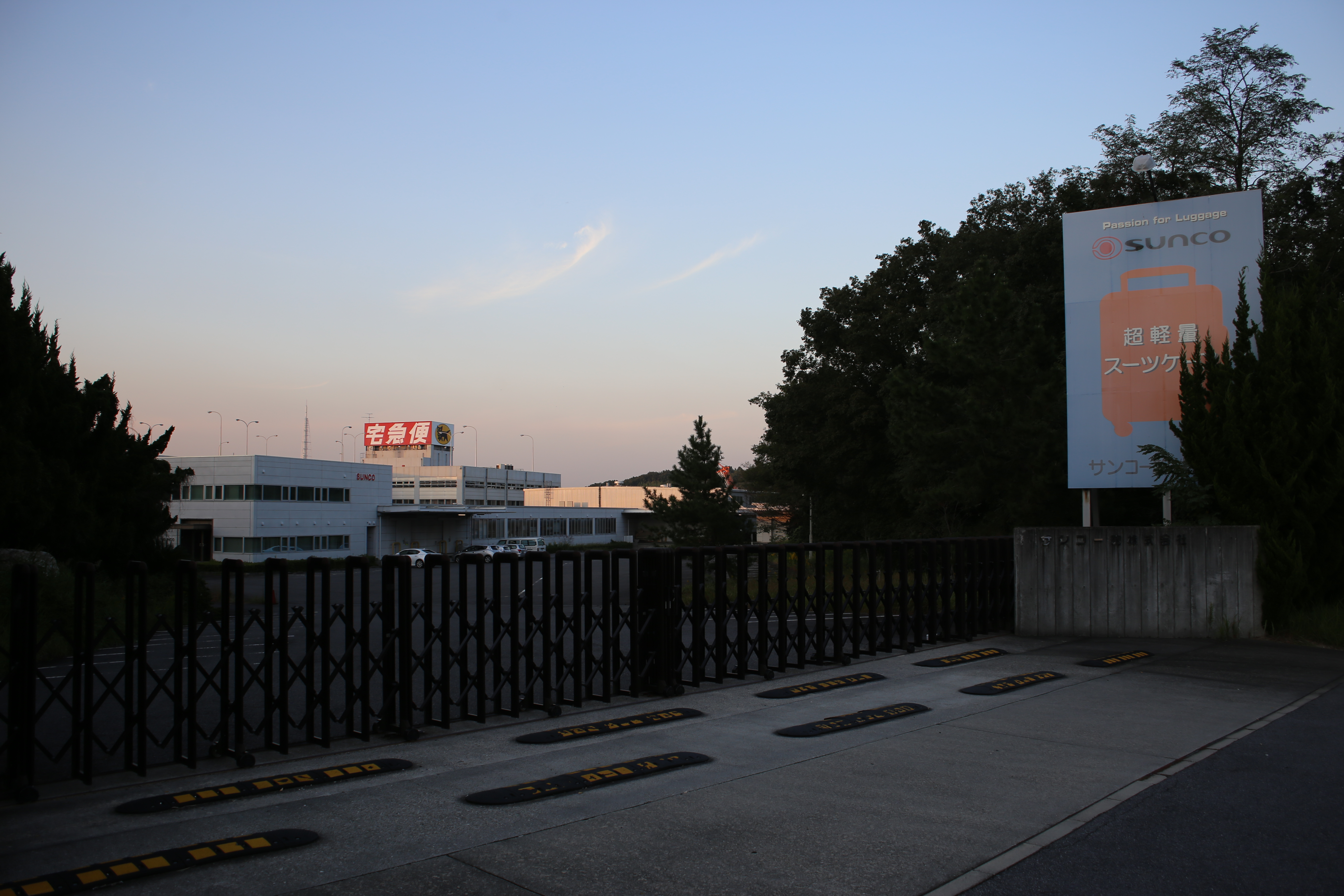 愛知県長久手市のサンコー鞄本社